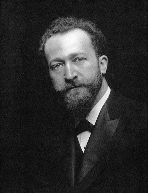 Louis Hillier, compositeur belge